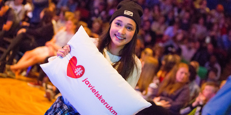 Gloria Vitaly med sin UKM-pute